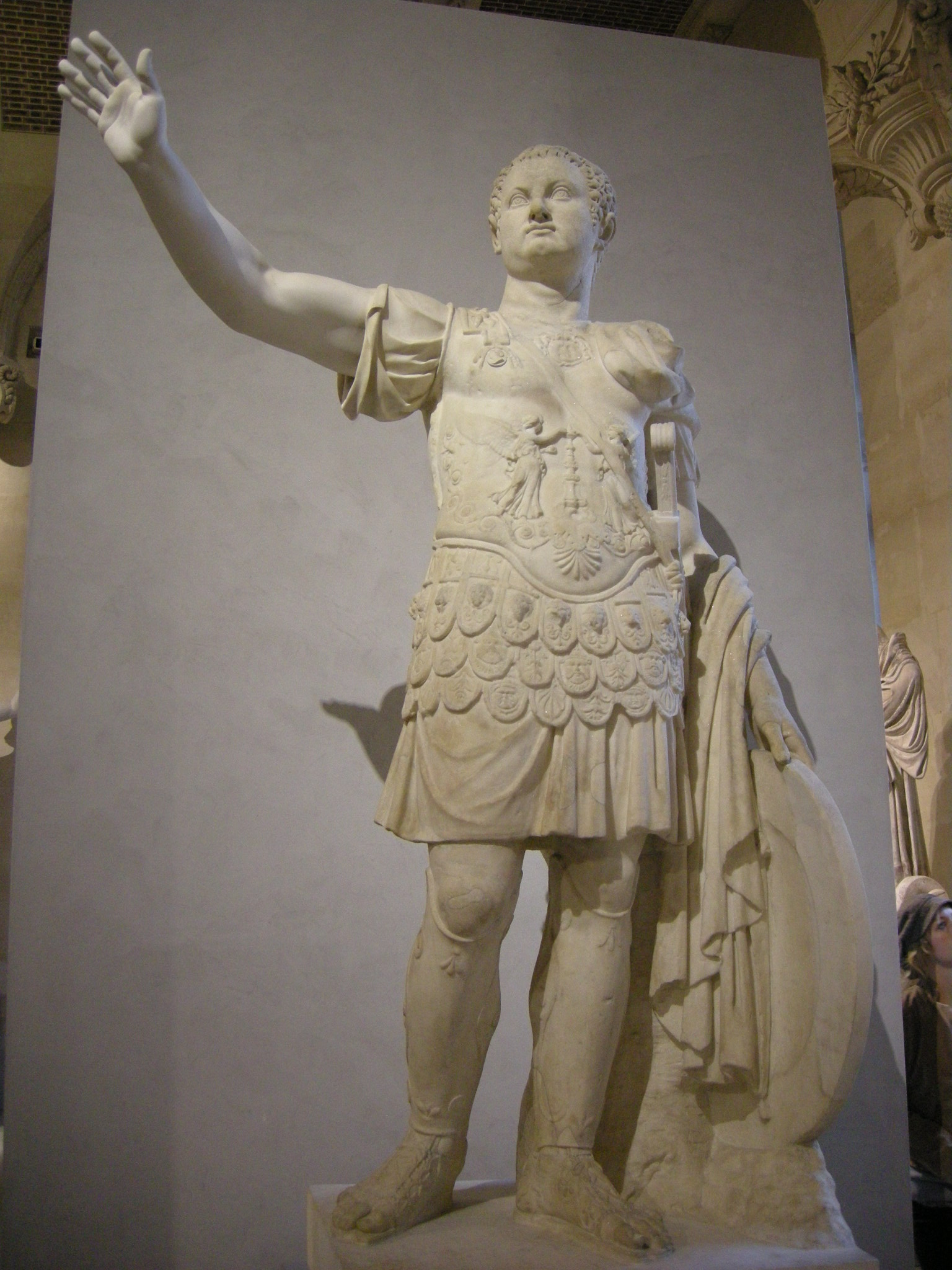 Tito, fine I sec. dc..JPG